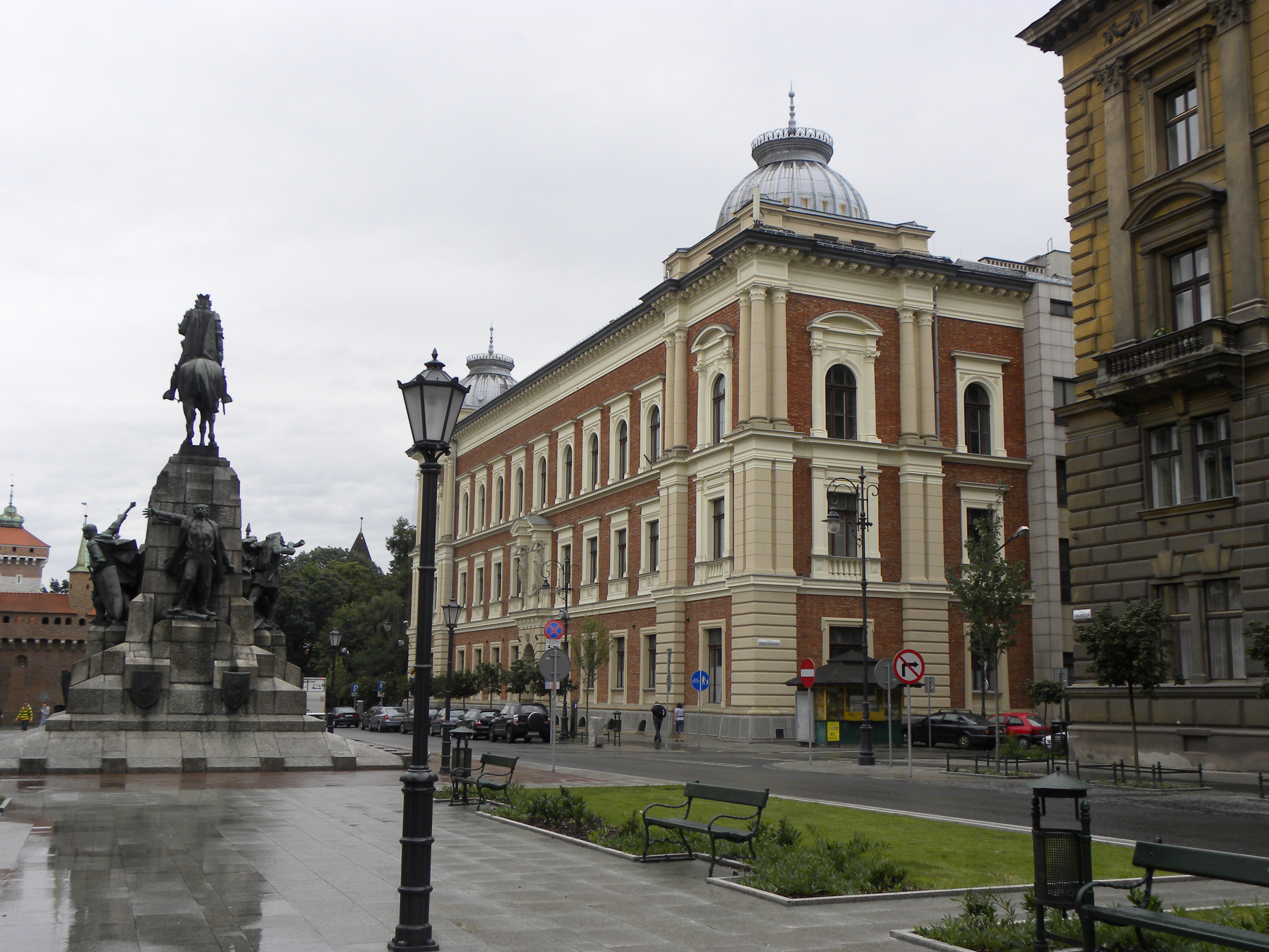 zdjęcia z największych miast